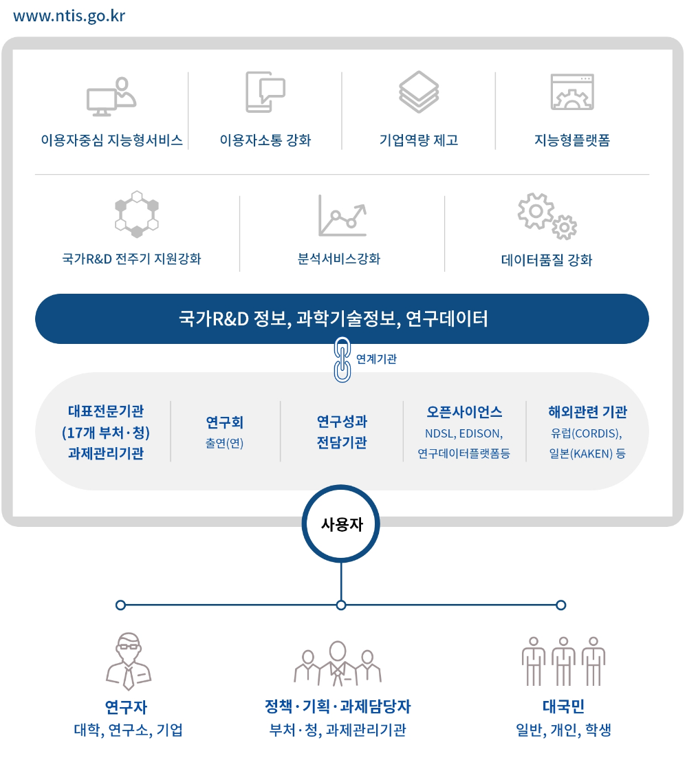 NTIS 소개